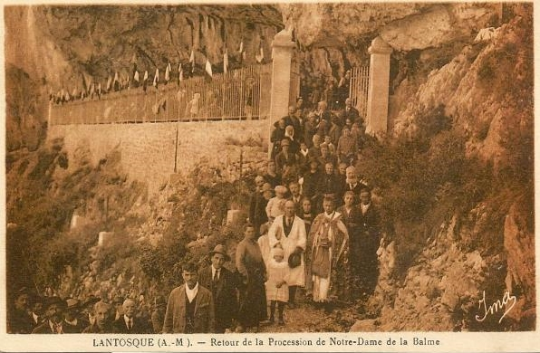 Retour de la procession, des pénitents blancs et des villageois, de Notre Dame de la Balma.Lantosque